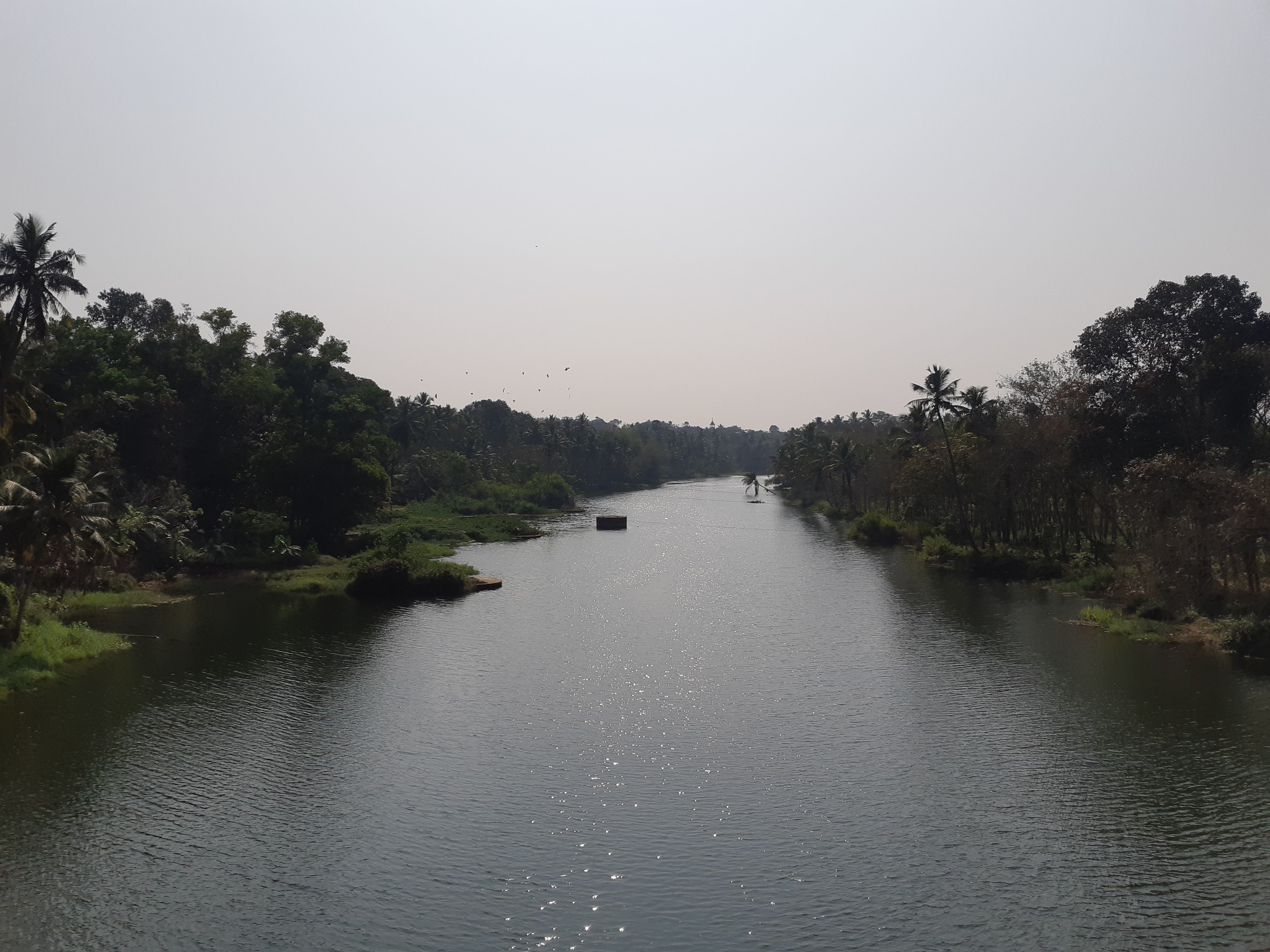 இந்த புகைப்படத்தை நான் Click செய்தது 24 January 2019 அன்று